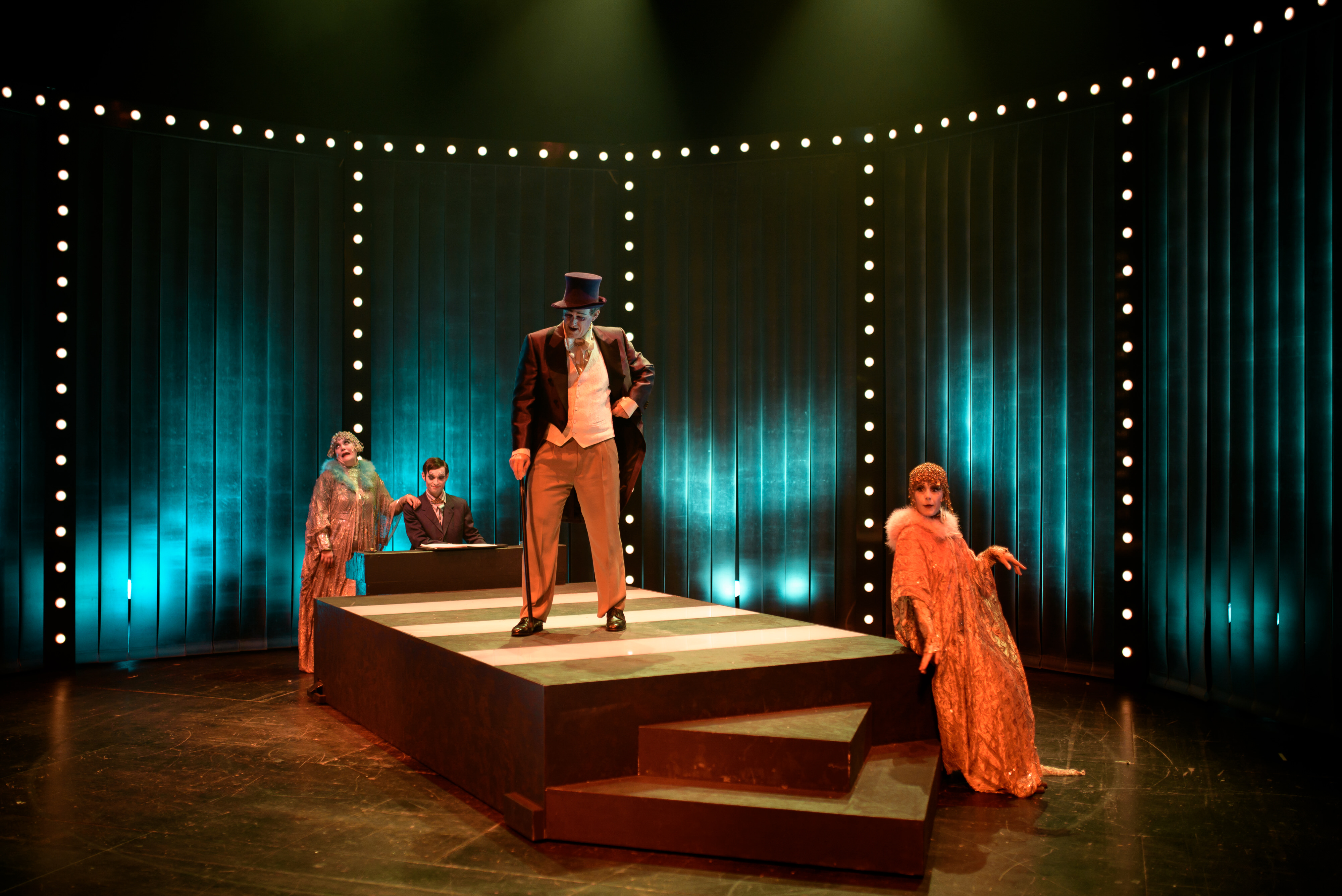 Patxo Telleriaren Simplicissimus antzezlana